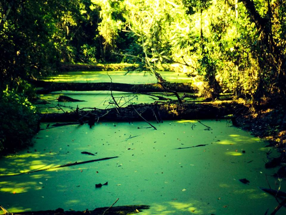 Córrego da estação ecológica